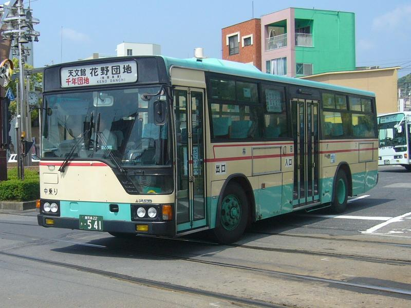 登録番号 鹿児島22き・541 いわさきバスネットワーク鹿児島営業所所属（撮影当時は林田バス） 2007年5月1日 鹿児島駅前にて撮影